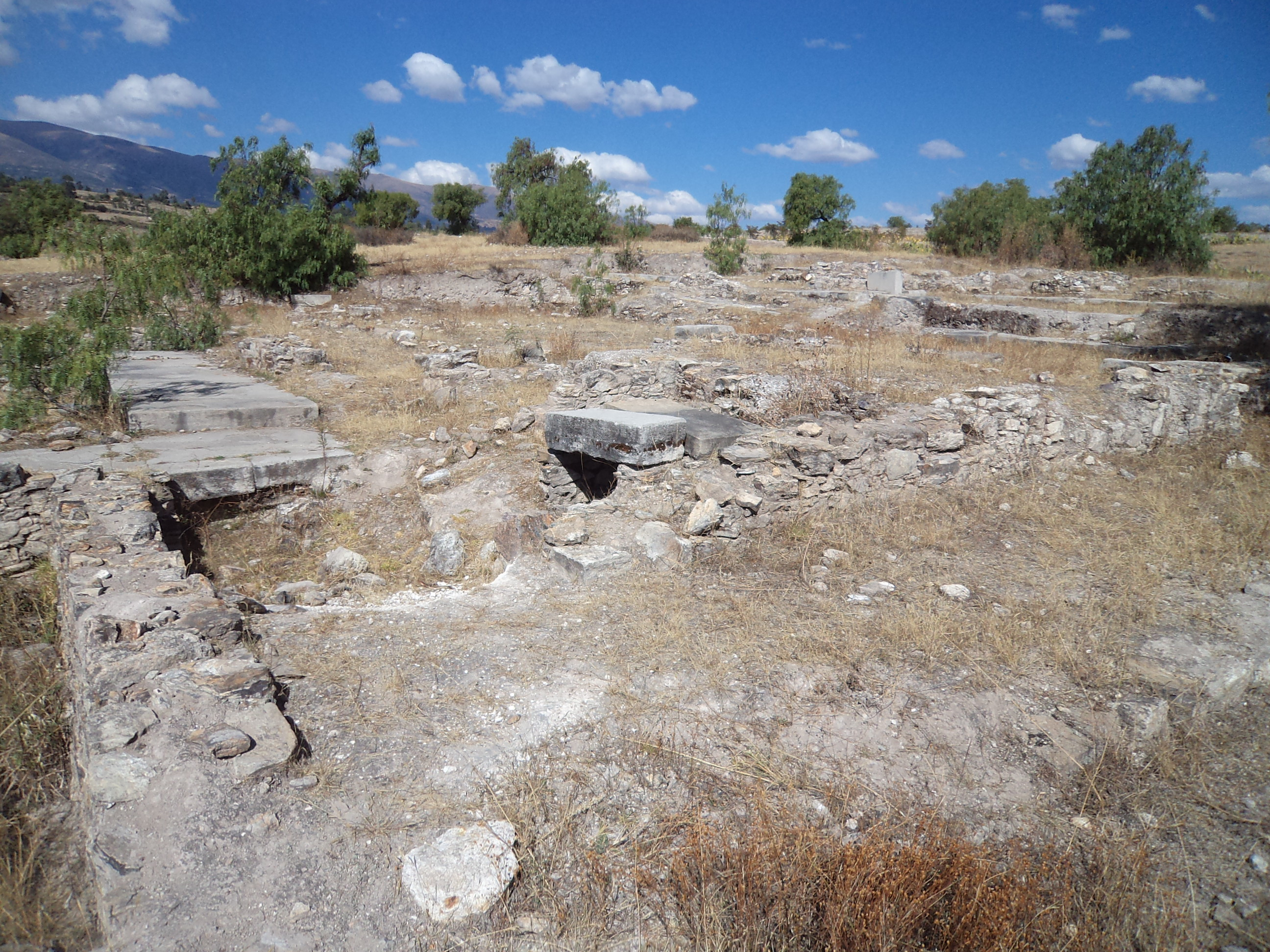 maraynitoq_2